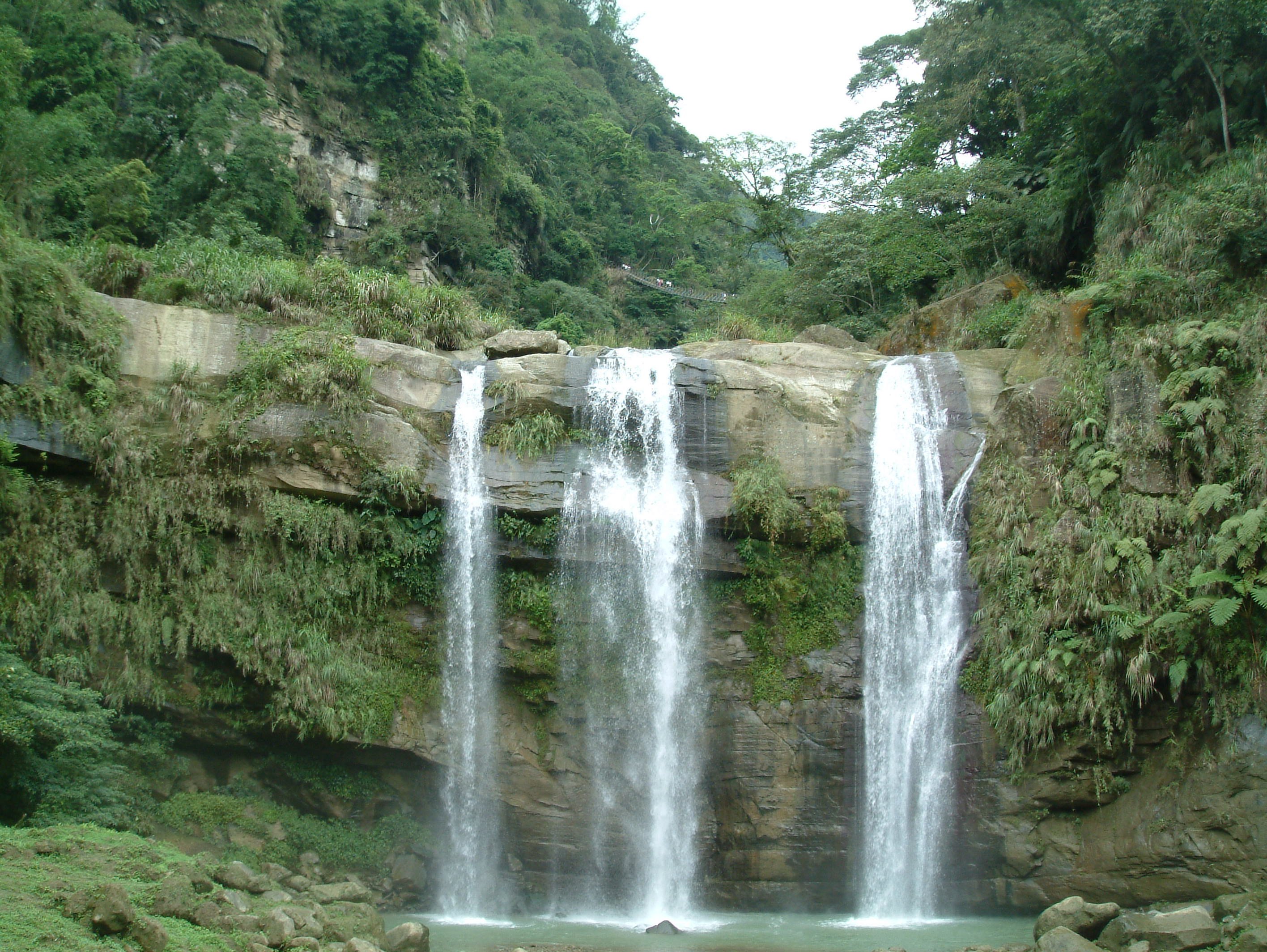 太極峽谷青龍瀑布。